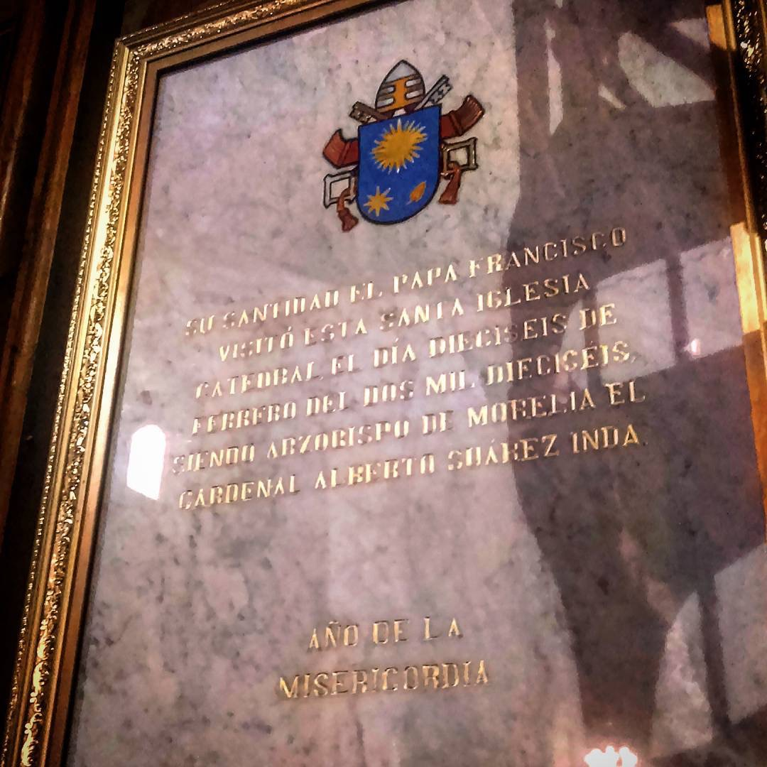 PLACA CONMEMORATIVA VISITA PAPA FRANCISCO A MORELA